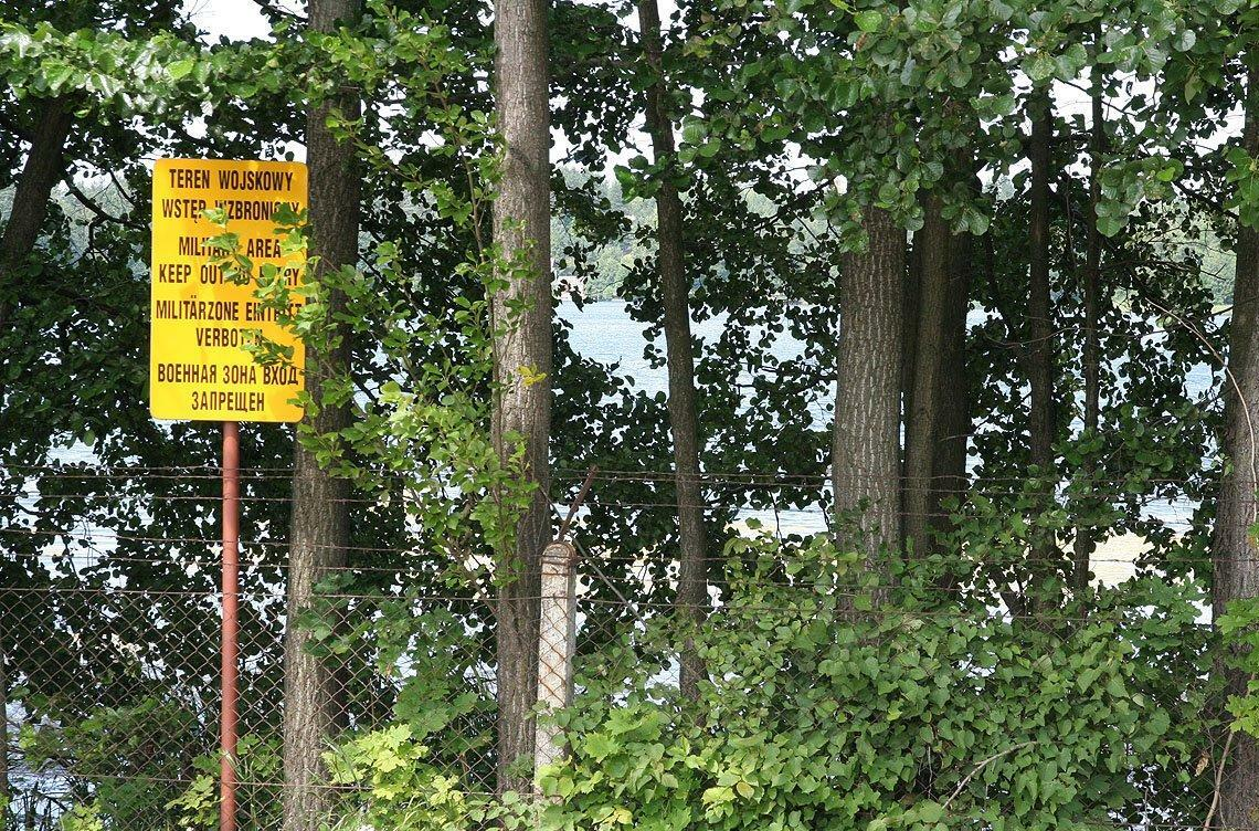 Widok z drogi na jezioro Starokiejkuckie, ogrodzone ze względu na leżący nad jeziorem Ośrodek Szkolenia Agencji Wywiadu.